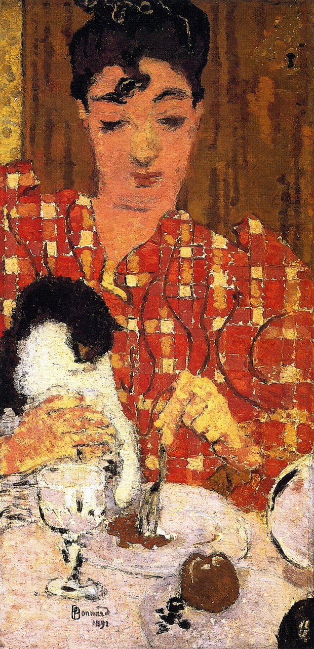 картины французского художника Pierre Bonnard (1867 - 1947)